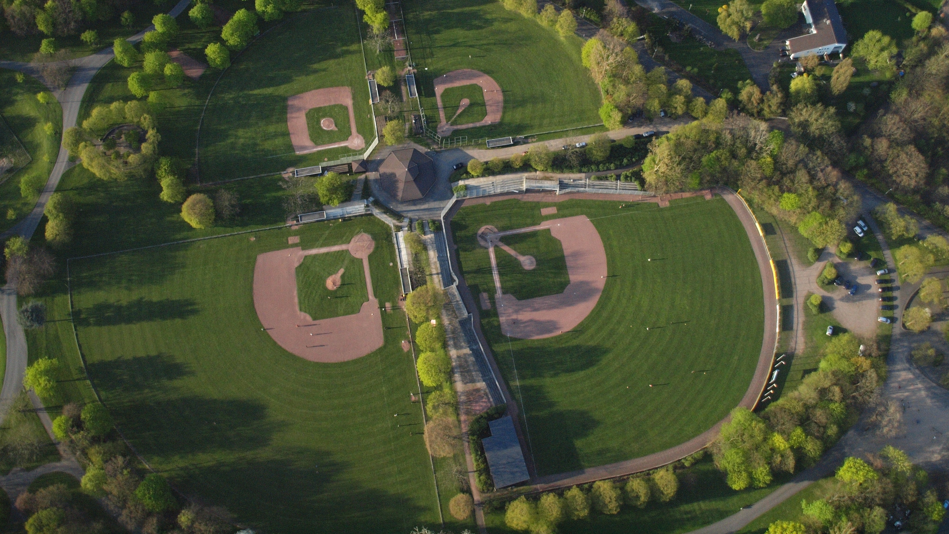 Baseballstadion in der Rheinaue, Bonn